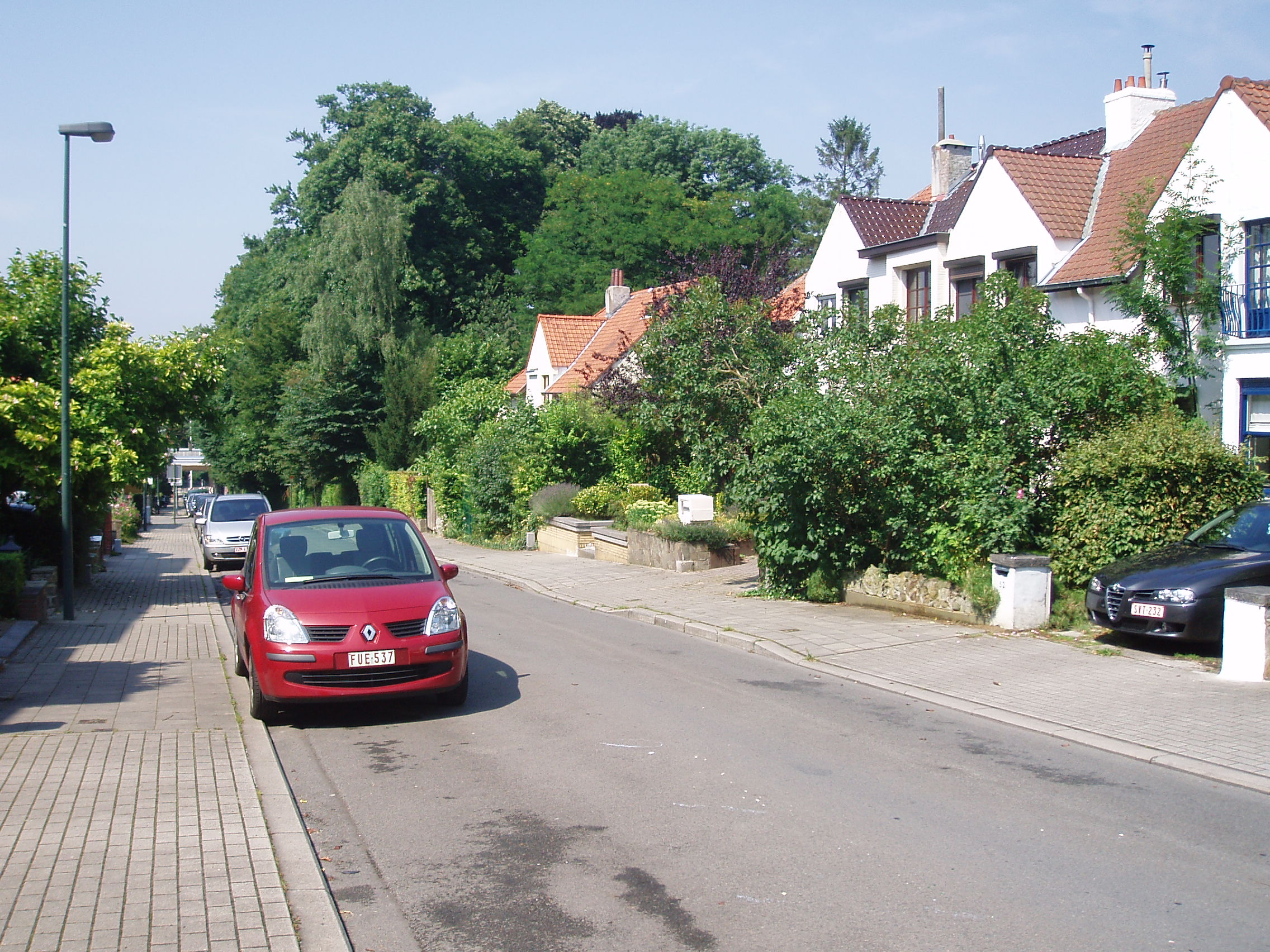 avenue des Frères Goemaere Auderghem Belgium